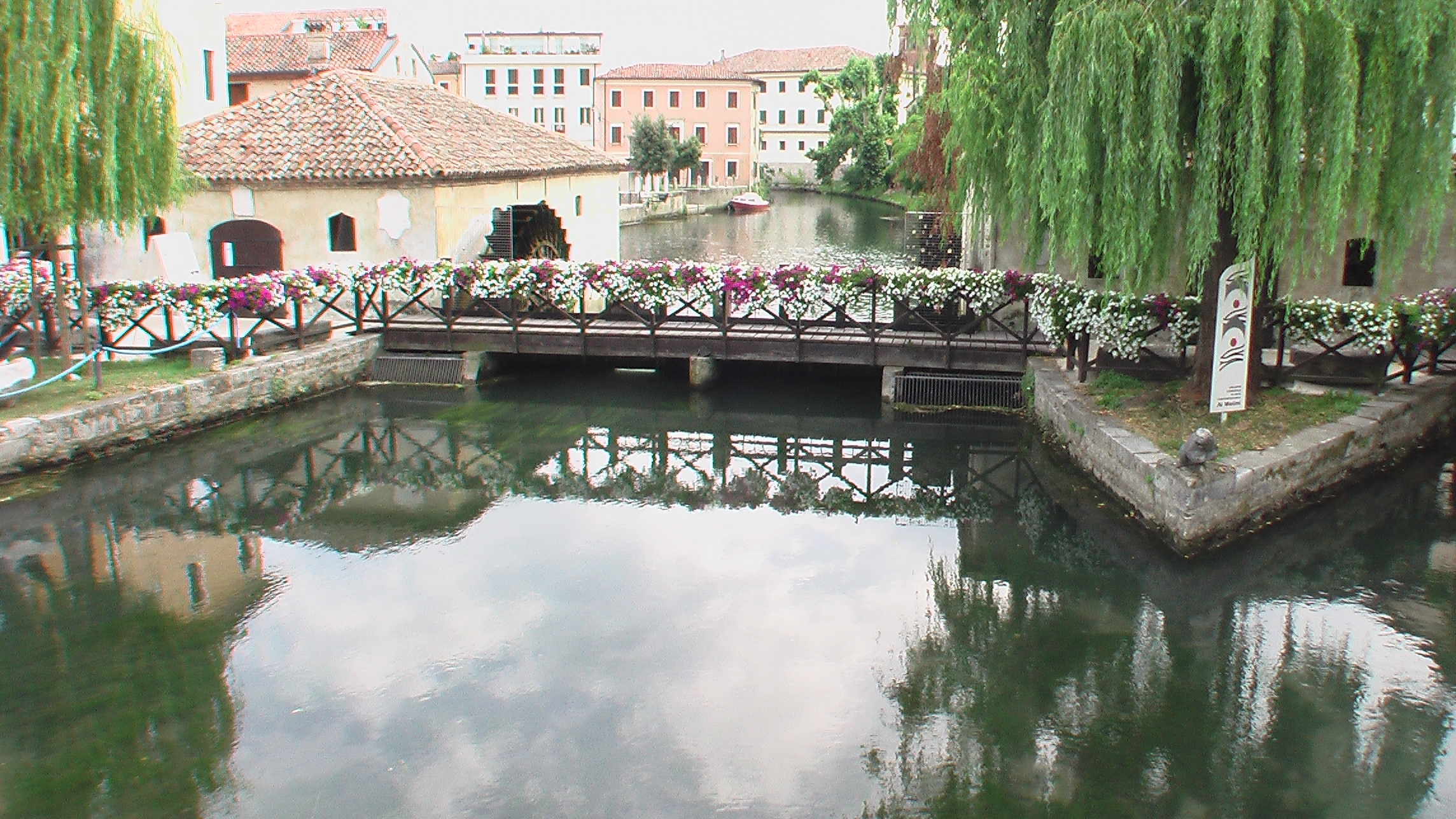 Portogruaro, ein "kleines Venedig"